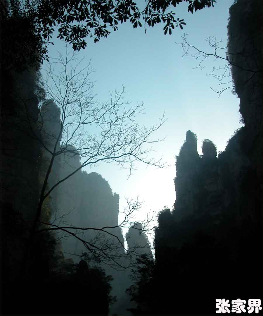 Cncs－zh:2005年zh:3月5日拍摄